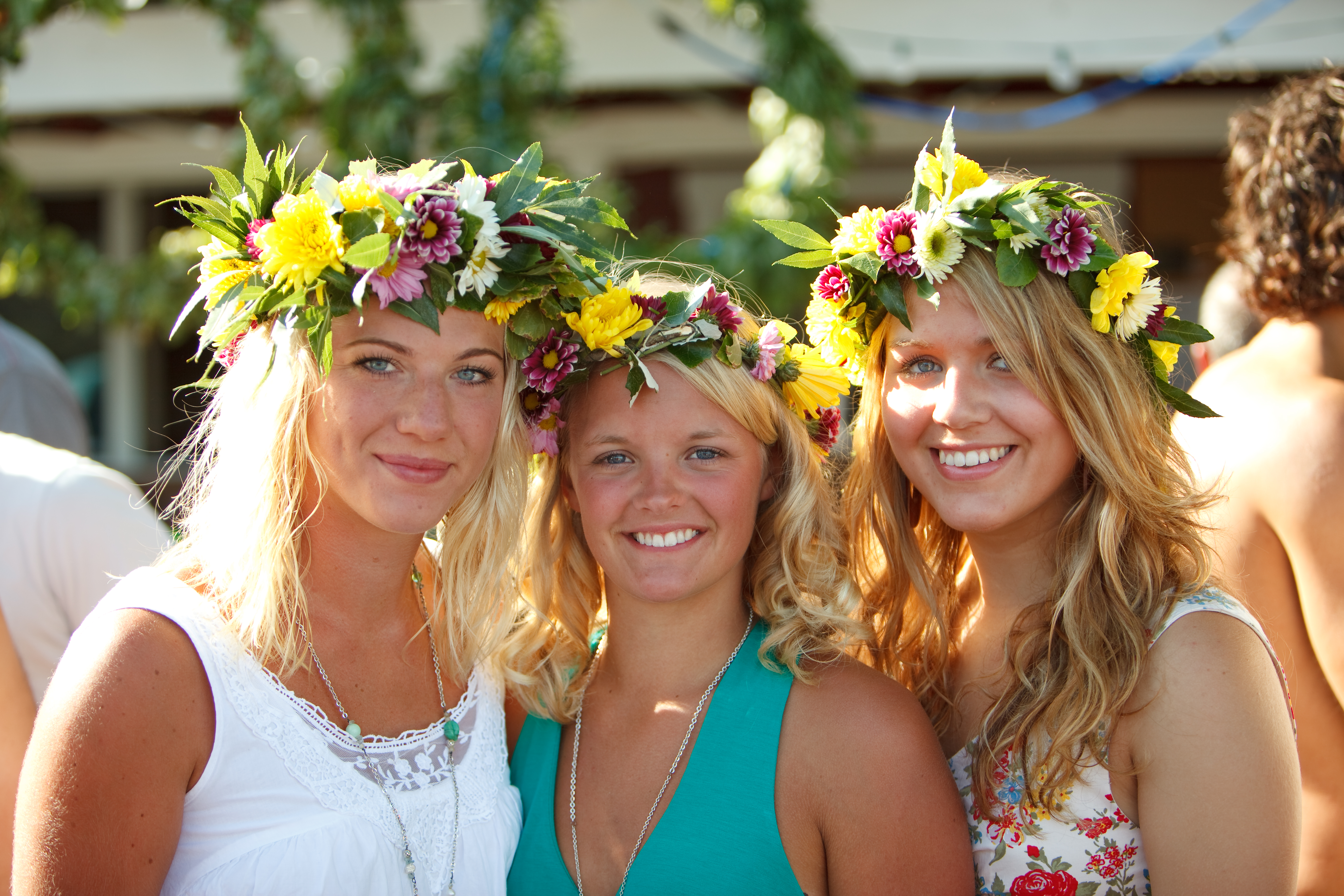 Flickor med midsommarkransar, 2009.